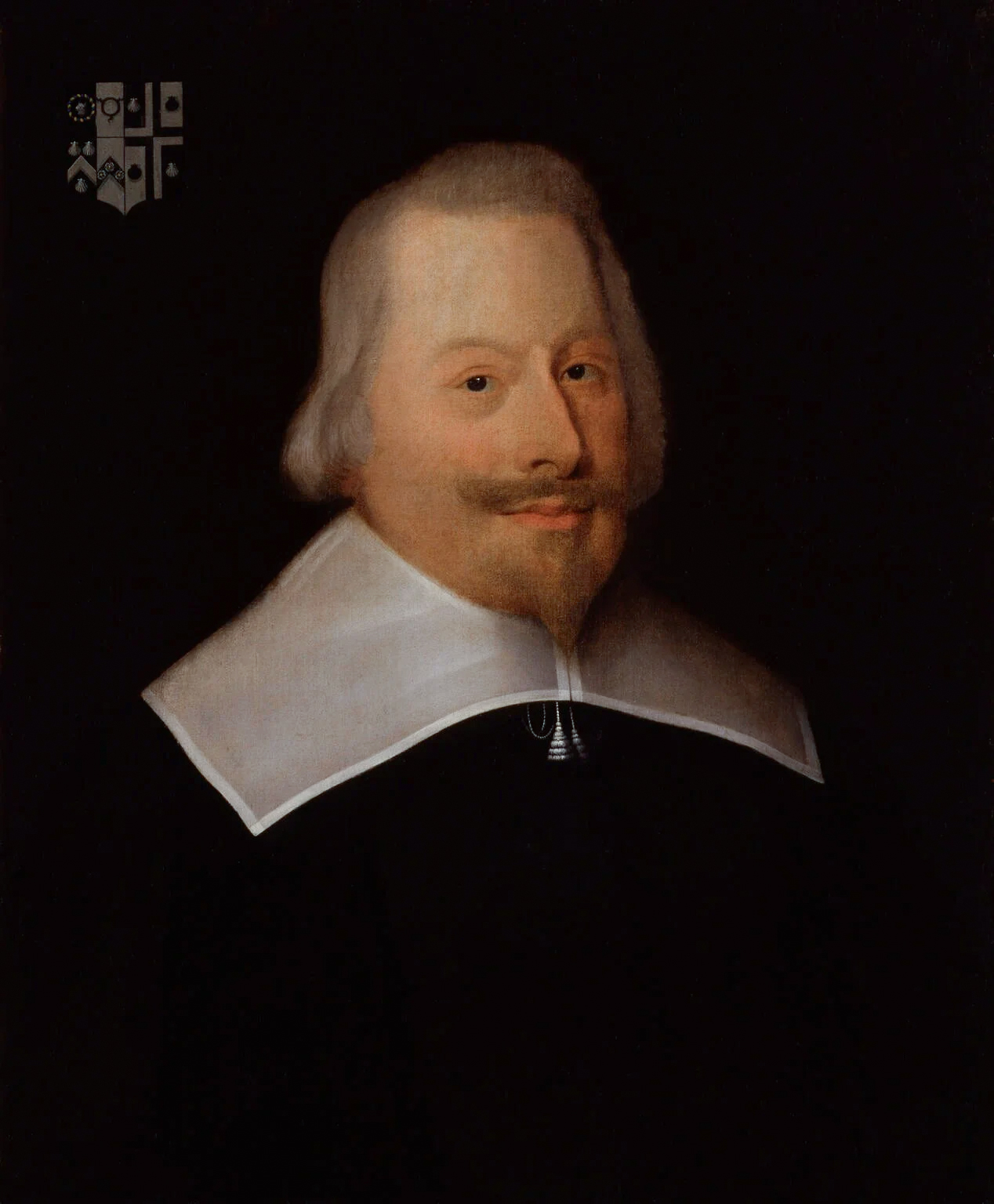 John Pym